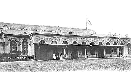 Варшавский вокзал в Гатчине , только в Петербурге, сторона отправления поездов!!!